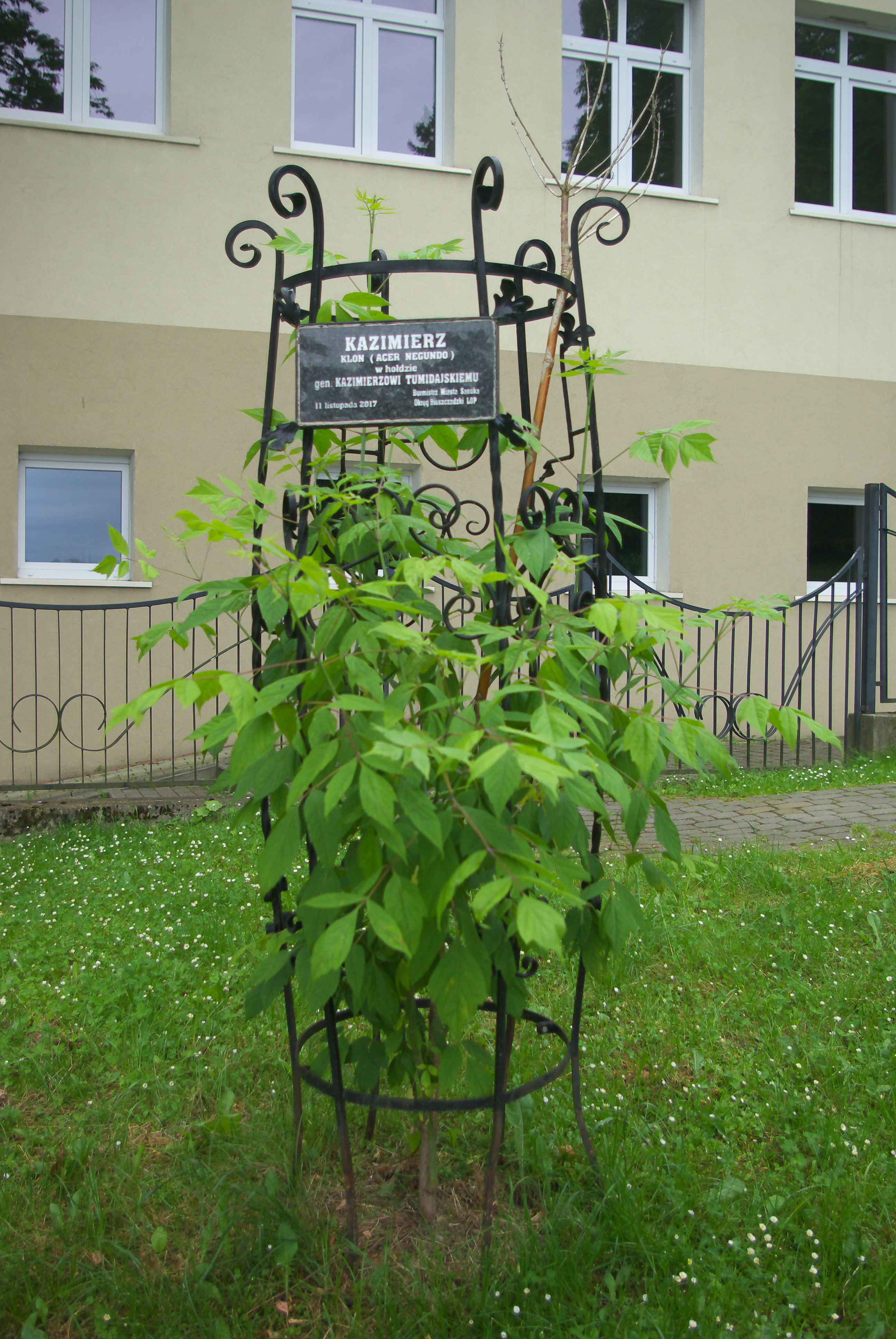 Klon „Kazimierz” upamiętniający Kazimierza Tumidajskiego na Placu Harcerskim w Sanoku.